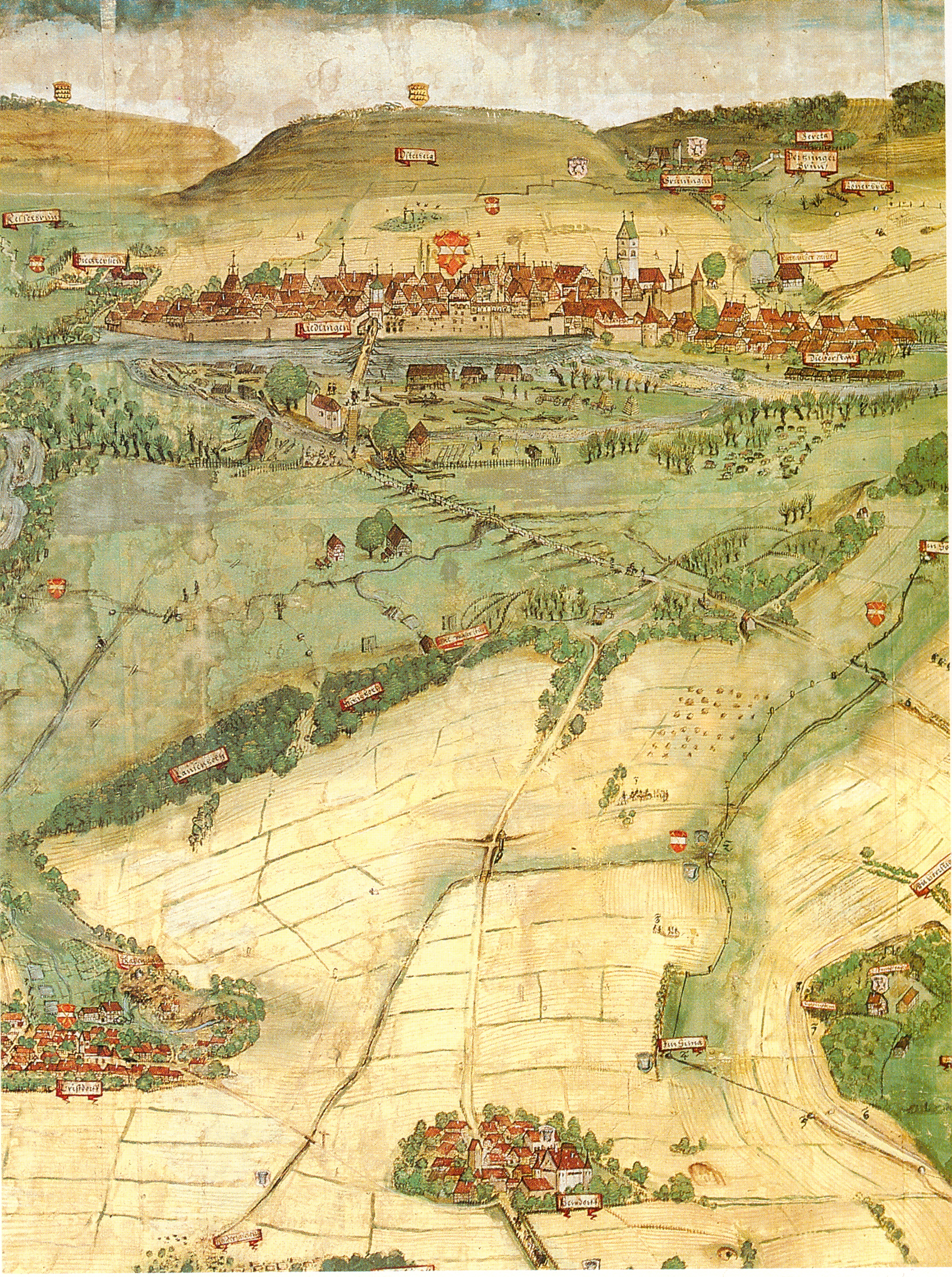 Landtafel des oberen Donaugebietes-Detail Stuttgart Papier, auf Leinen aufgezogen, aquarellierte Federzeichnung eingescannt aus: Die Renaissance im deutschen Südwesten zwischen Reformation und Dreißigjährigem Krieg. Eine Ausstellung des Landes Baden-Württemberg, Heidelberger Schloss, 21. Juni - 19 Oktober 1986